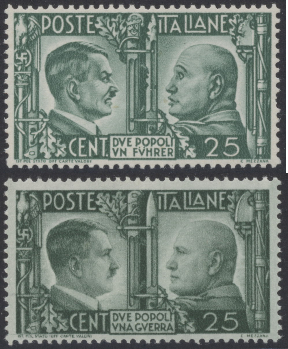 Vergleich: Britische Propagandafälschung für Italien (oben); Echte Marke (Michel Nr. 625, Italien) (unten). Außer karikaturistischen Änderungen der Köpfe Hitlers und Mussolinis wurden der Text von (übersetzt) "2 Völker, ein Krieg" in "2 Völker ein Führer" abgeändert